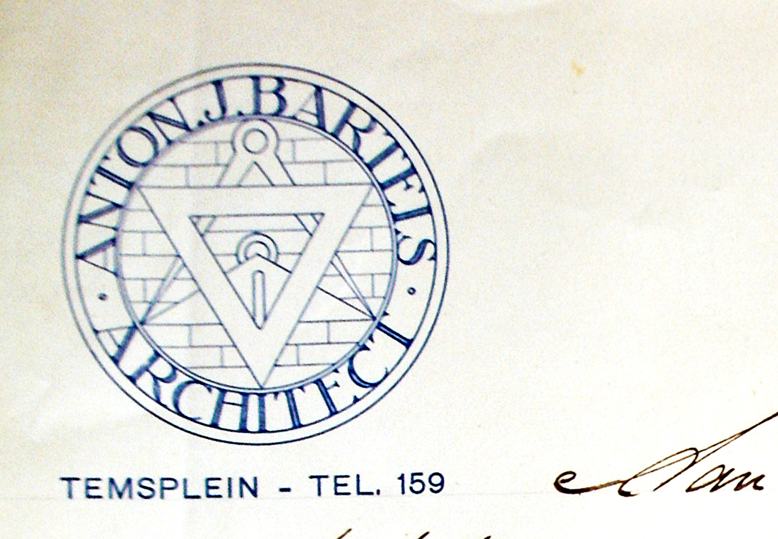 briefhoofd dat architekt Anton Bartels gebruikte